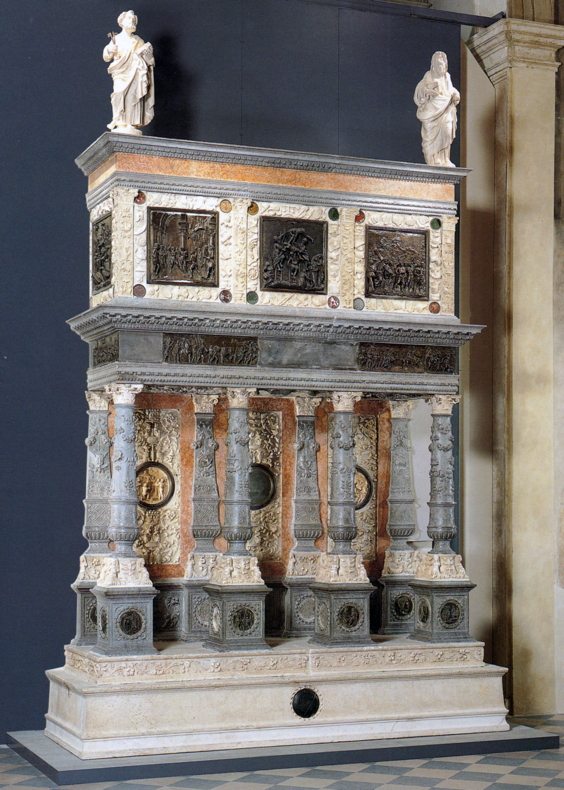 Mausoleo Martinengo (Museo di Santa Giulia, Brescia)